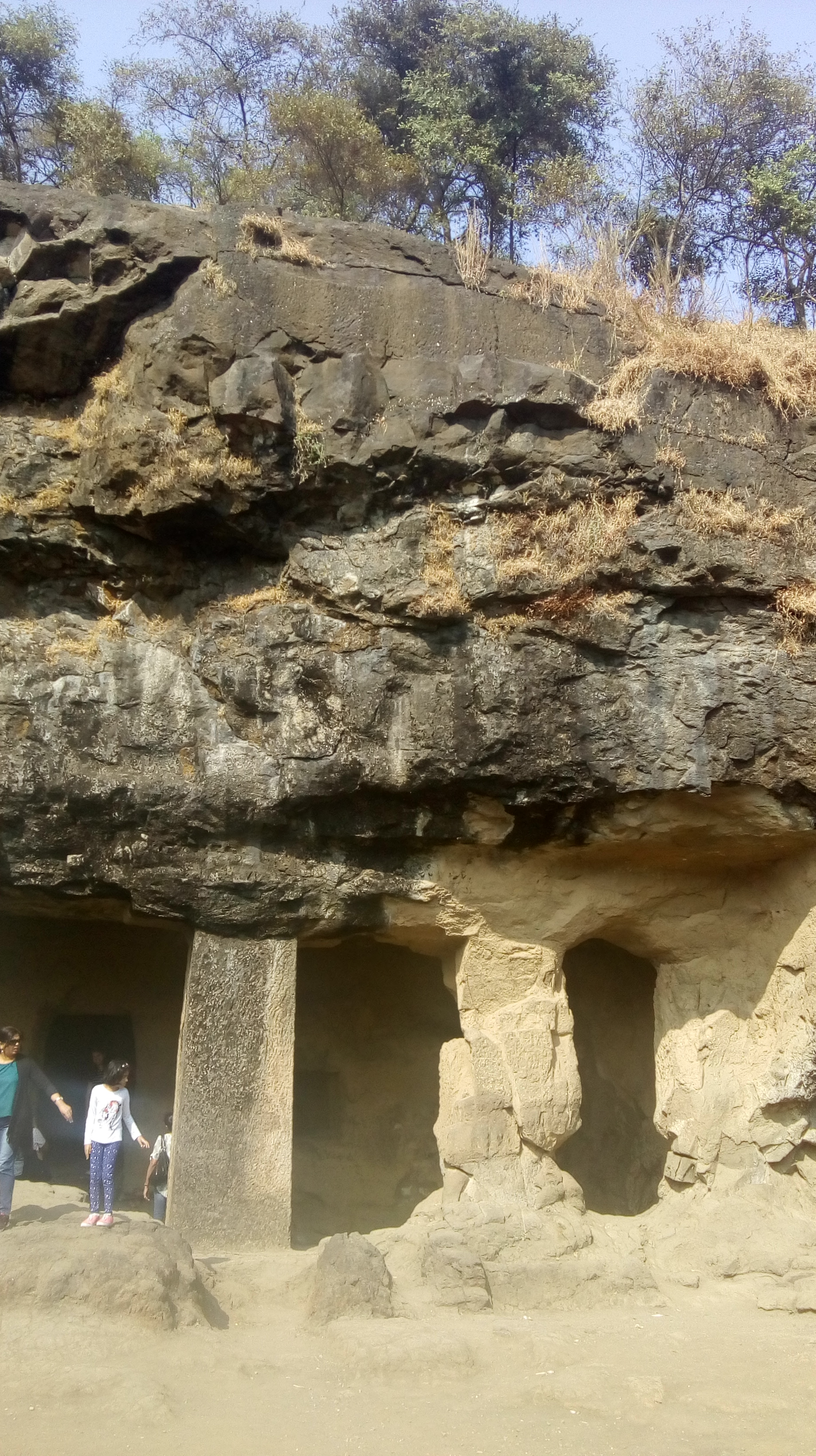 एलिफन्टा कॅव्हेस छायाचित्रे